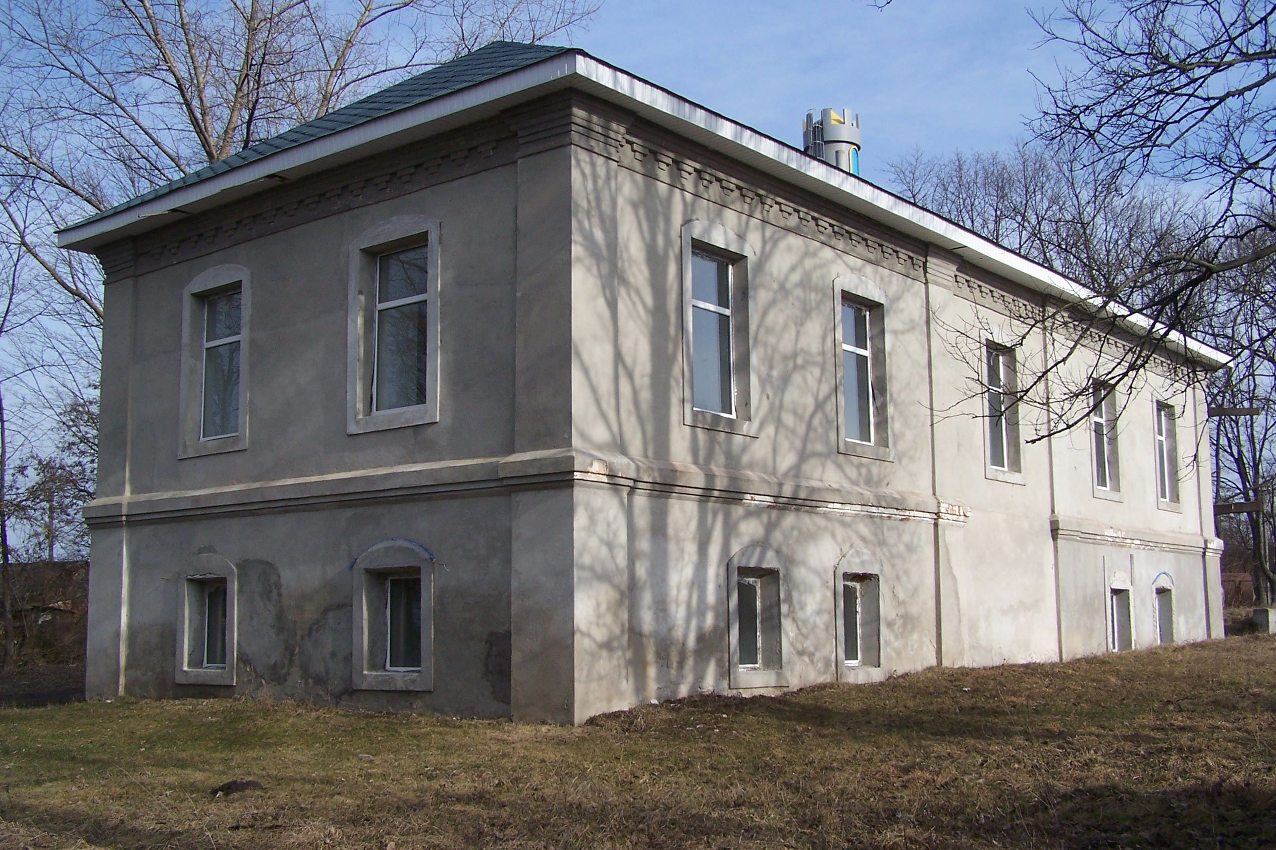 Покровська церковнопарафіяльна школа початку ХХ ст. у Батурині, сучасний вигляд